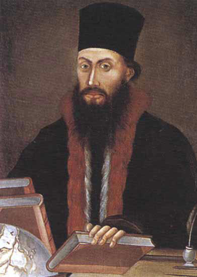 Портрет на Неофит Рилски от Захари Зограф.